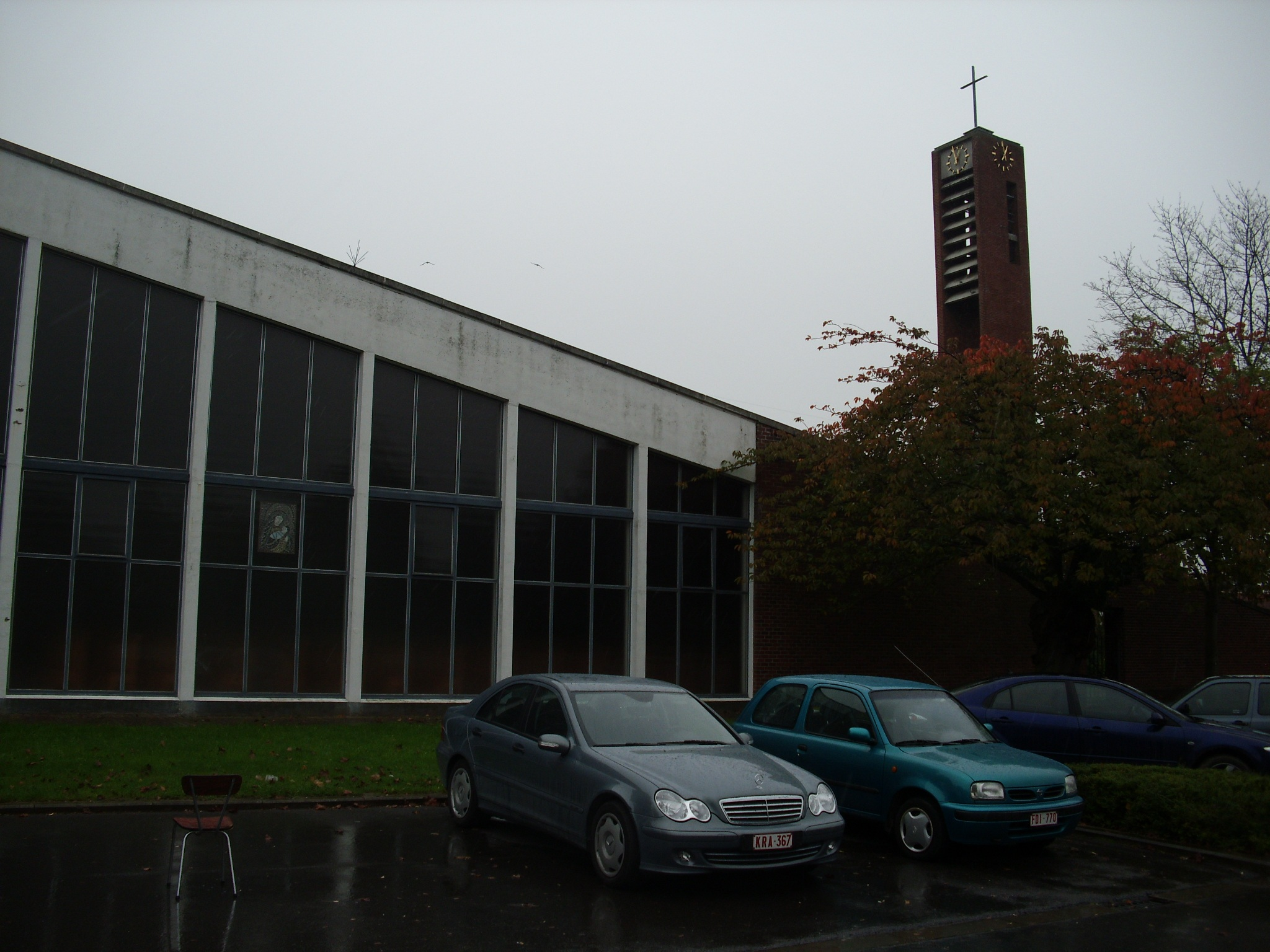 Johannes Maria Vianney-kerk - Heizijdestraat - Heizijde - Lebbeke - Oost-Vlaanderen - Vlaanderen - België